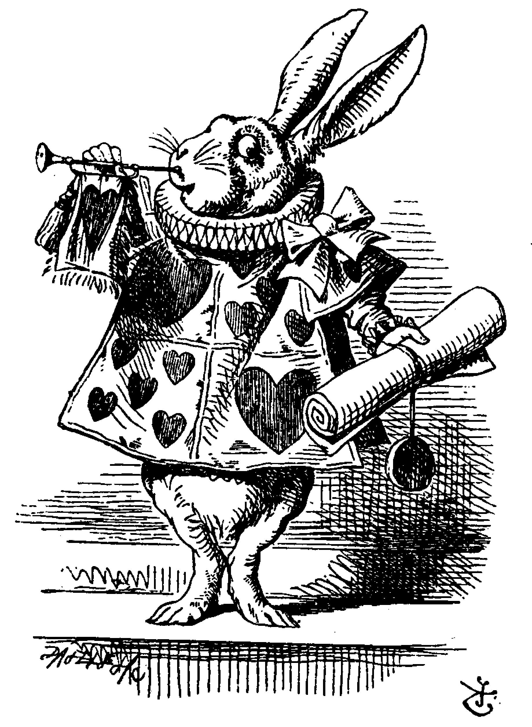 Alice’s Abenteuer im Wunderland Übersetzer: Antonie Zimmermann Orginal Titel: Alice's Adventures in Wonderland Illustrationen: John Tenniel